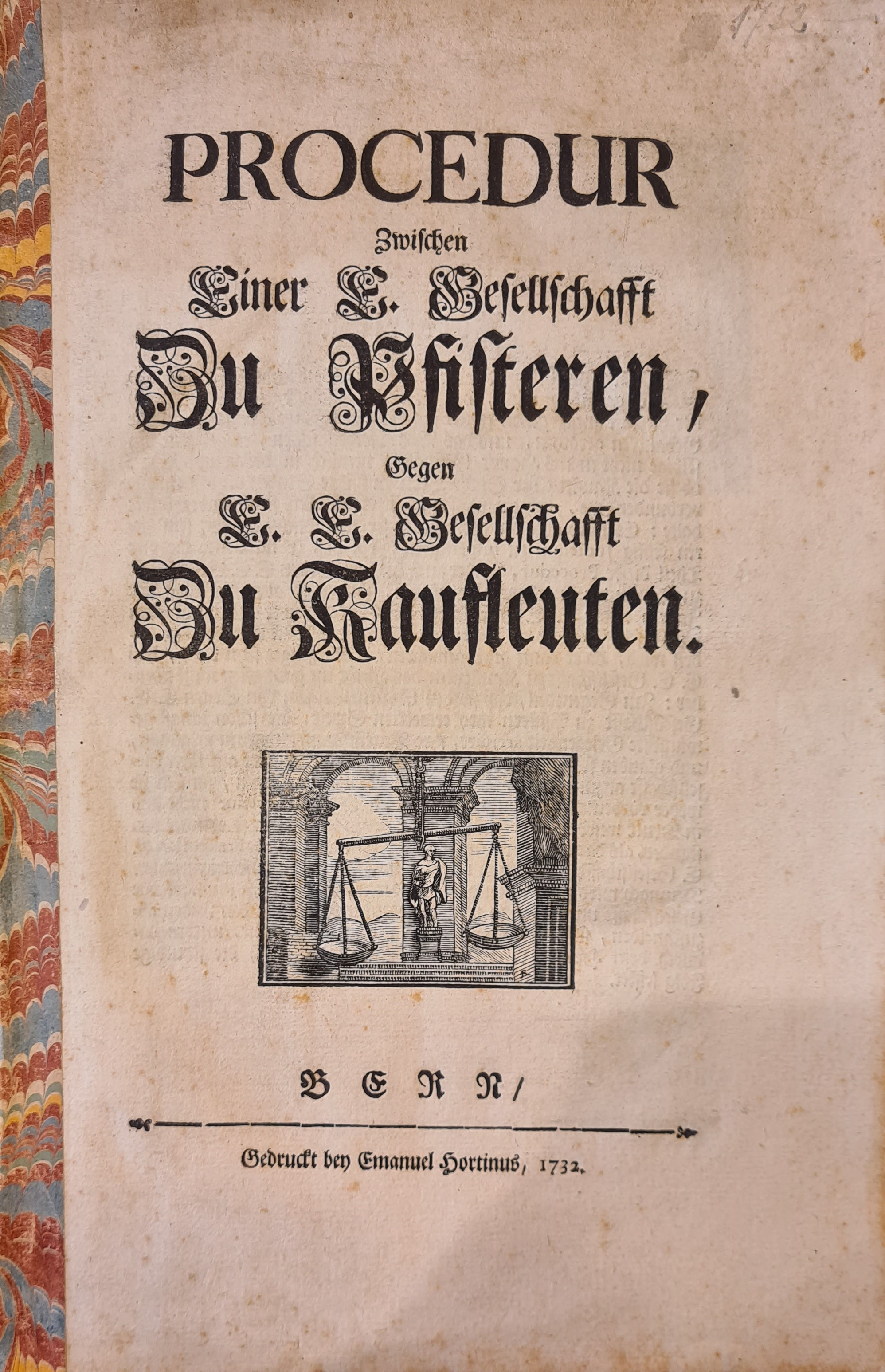 Procedur 1732